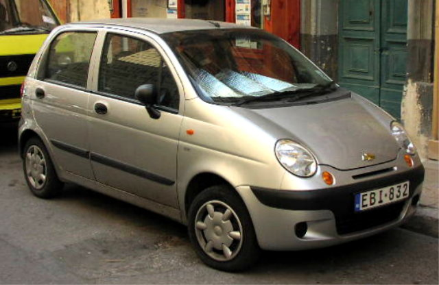 Chevrolet Matiz der ersten Baureihe (bis 2005). Das Foto zeigt die erste, bis 2005 gebaute Ausführung des Chevrolet Matiz. Die 2. Ausführung (Facelift) ab 2005 erhielt eine überarbeitete Front- und Heckpartie mit geänderter Leuchtenform und Anordnung.